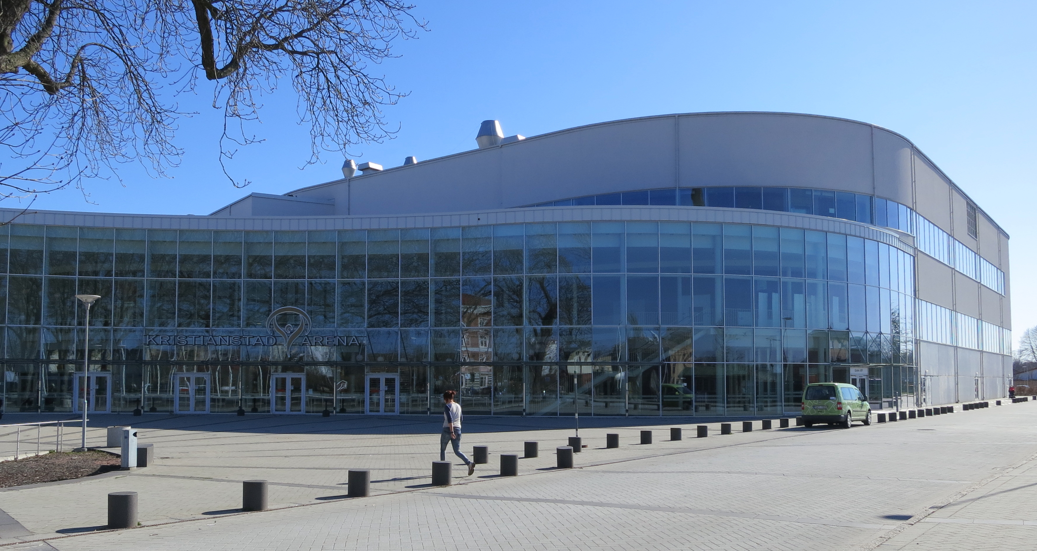 Kristianstad Arena, framsidan